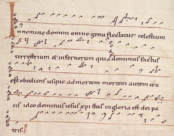 Graduale von Klosterneuburg, 12. Jahrhundert (Universitätsbibliothek Jena, MS 807): Antiphon In nomine Domini omne genu flectatur, caelestium, terrestrium et infernorum: quia Dominus factus obediens usque ad mortem, mortem autem crucis: ideo Dominus Iesus Christus in gloria est Dei Patris. (Phil. 2, 10)